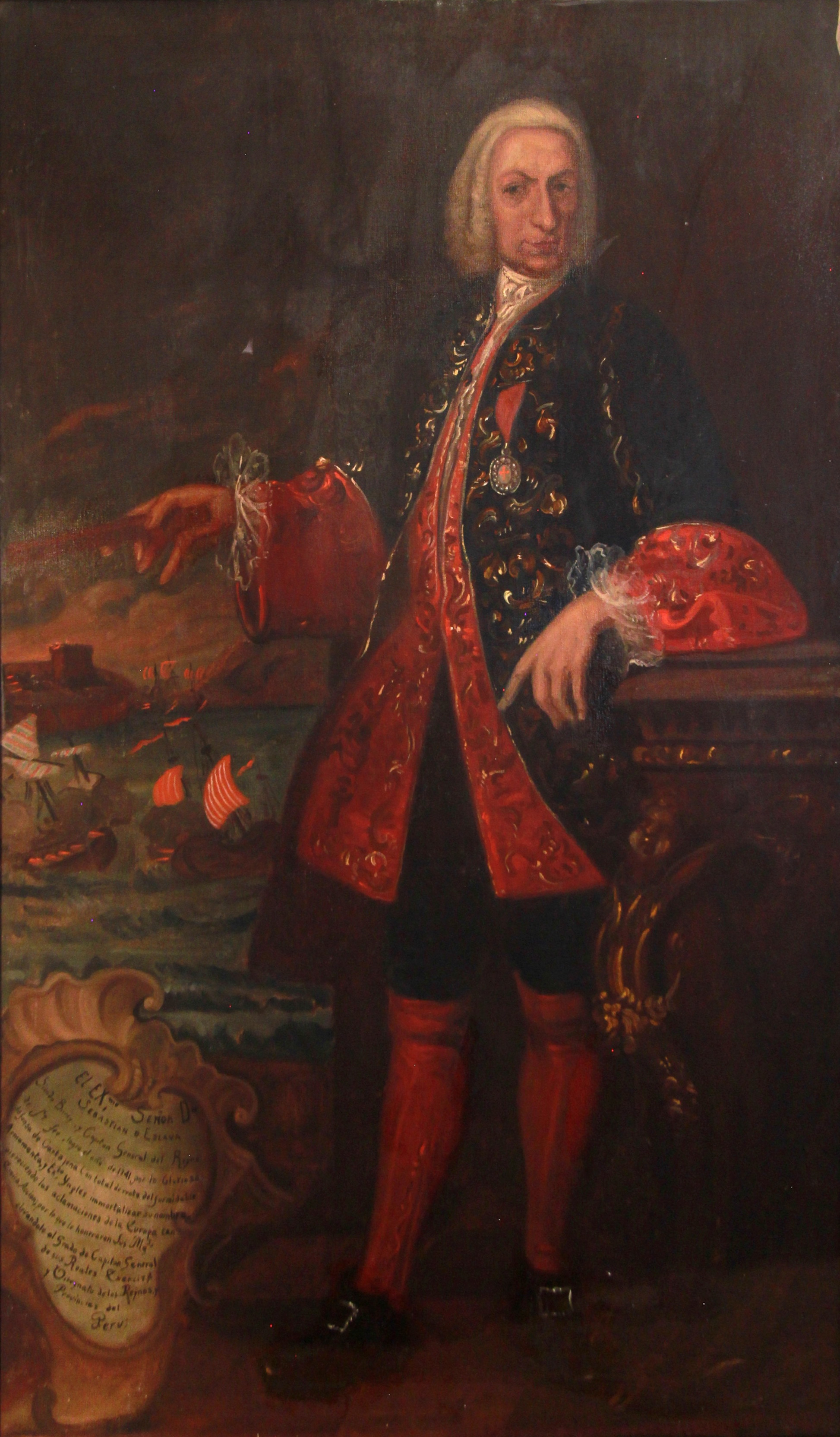 Cuadro perteneciente a la familia Mencos